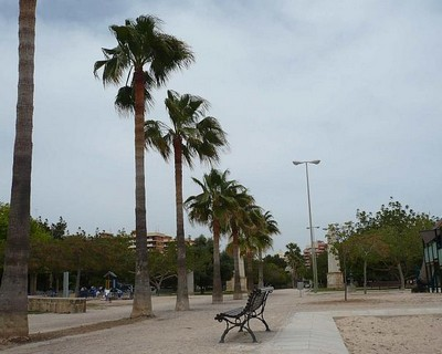 Parque de Kristian Krekovic en Palma de Mallorca